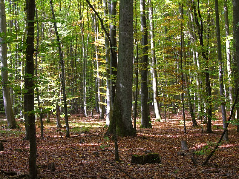 Gramschatzer Wald mit seiner typischen Laubwald-Prägung Foto 2007 Wolfgang Pehlemann Wiesbaden DSCN3168